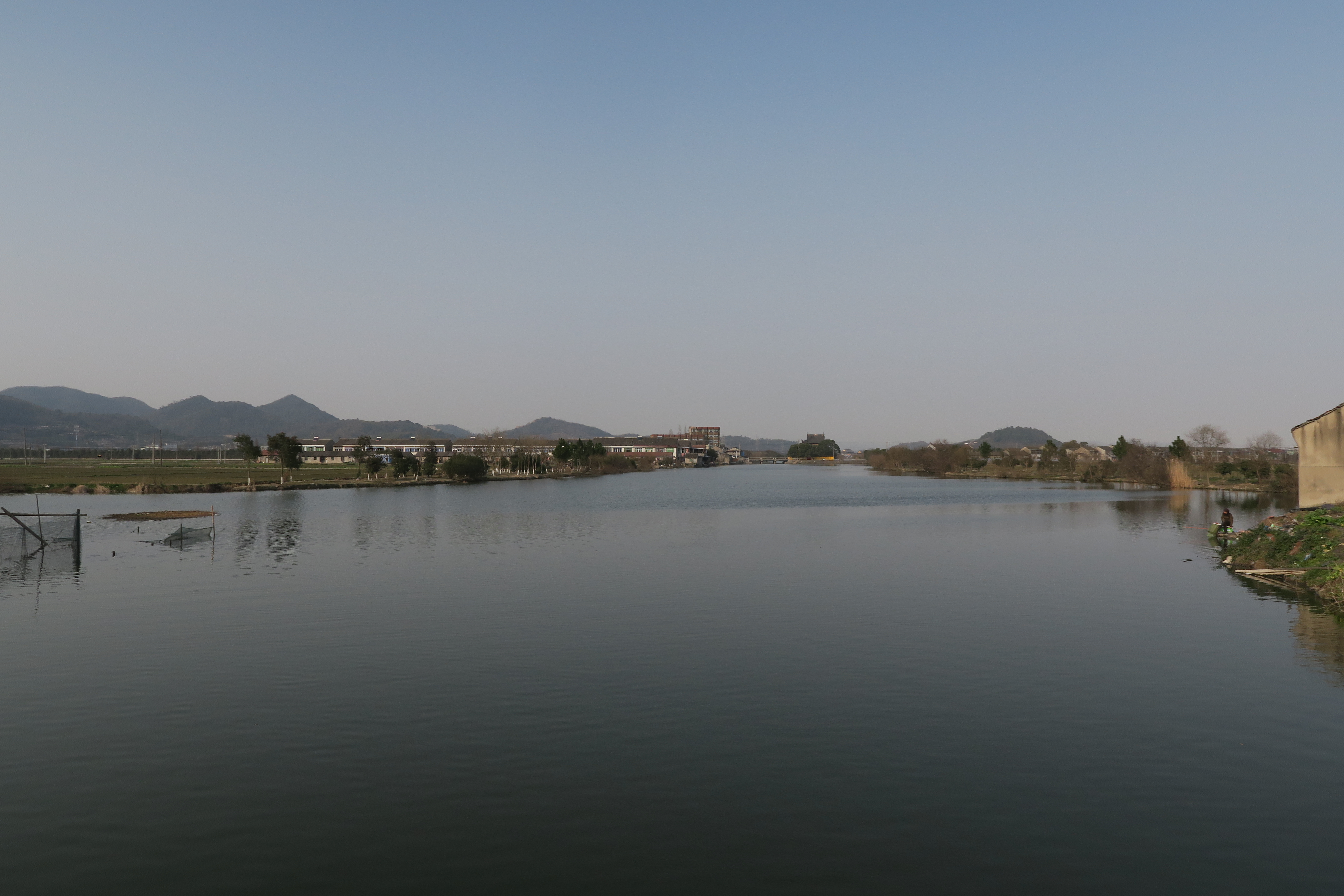 宁波集士港十三洞桥